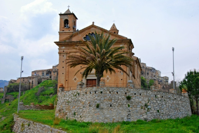 La chiesa è nella parte bassa del paese su un costone con ampia vista sul mar Jonio. Wikipedia: Badolato; Serre Calabresi; Parco Naturale Regionale delle Serre.